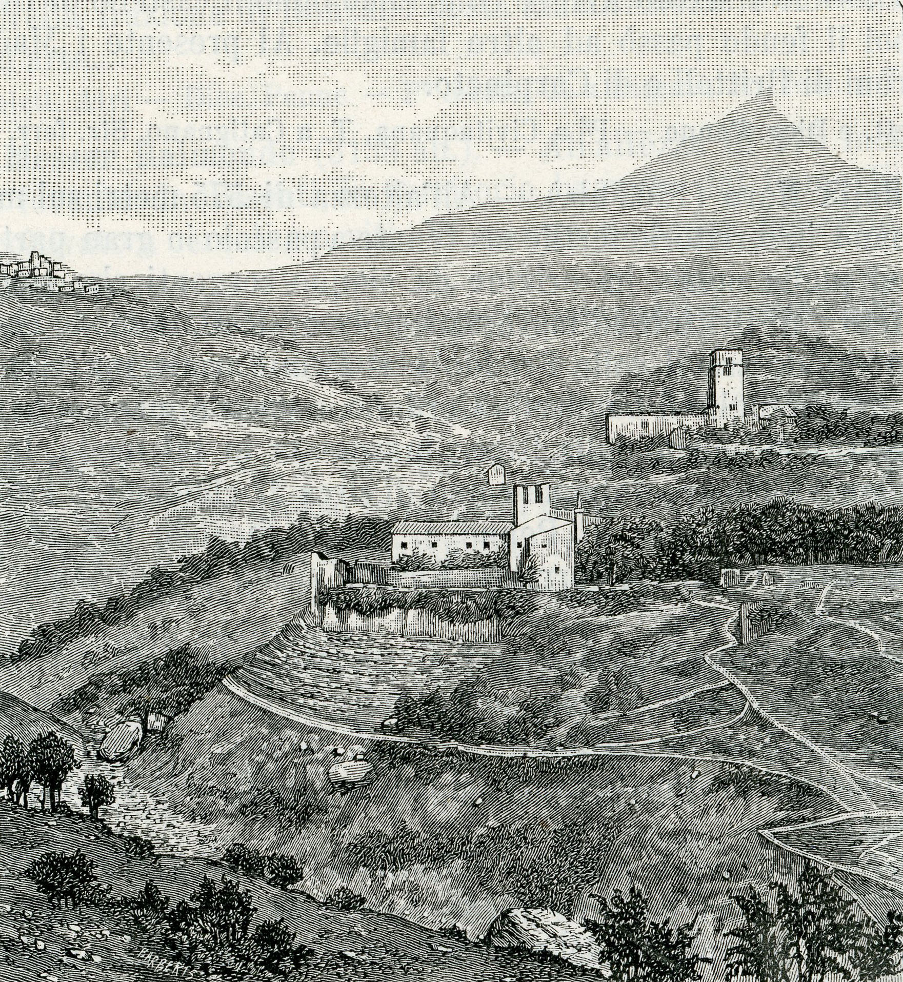 Celiera (frazione di Civitella): ruderi dell’antico convento di S. Maria Casanova (xilografia di Barberis 1898).